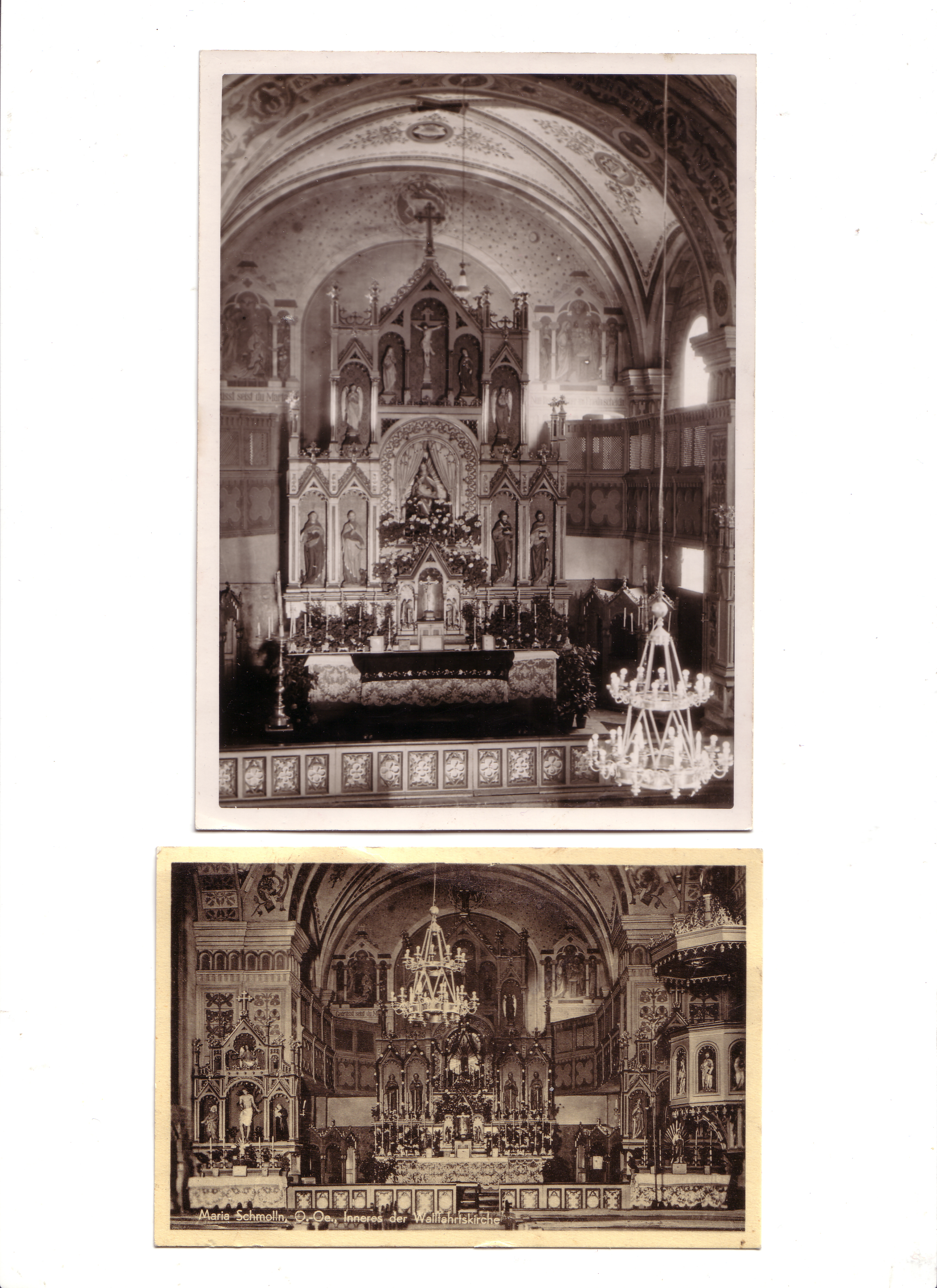 Innenraum der Wallfahrtskirche Maria Schmolln in Oberösterreich vor der Umgestaltung 1962